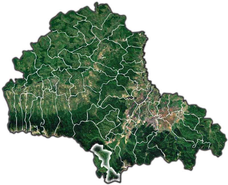 Moieciu jud Brasov